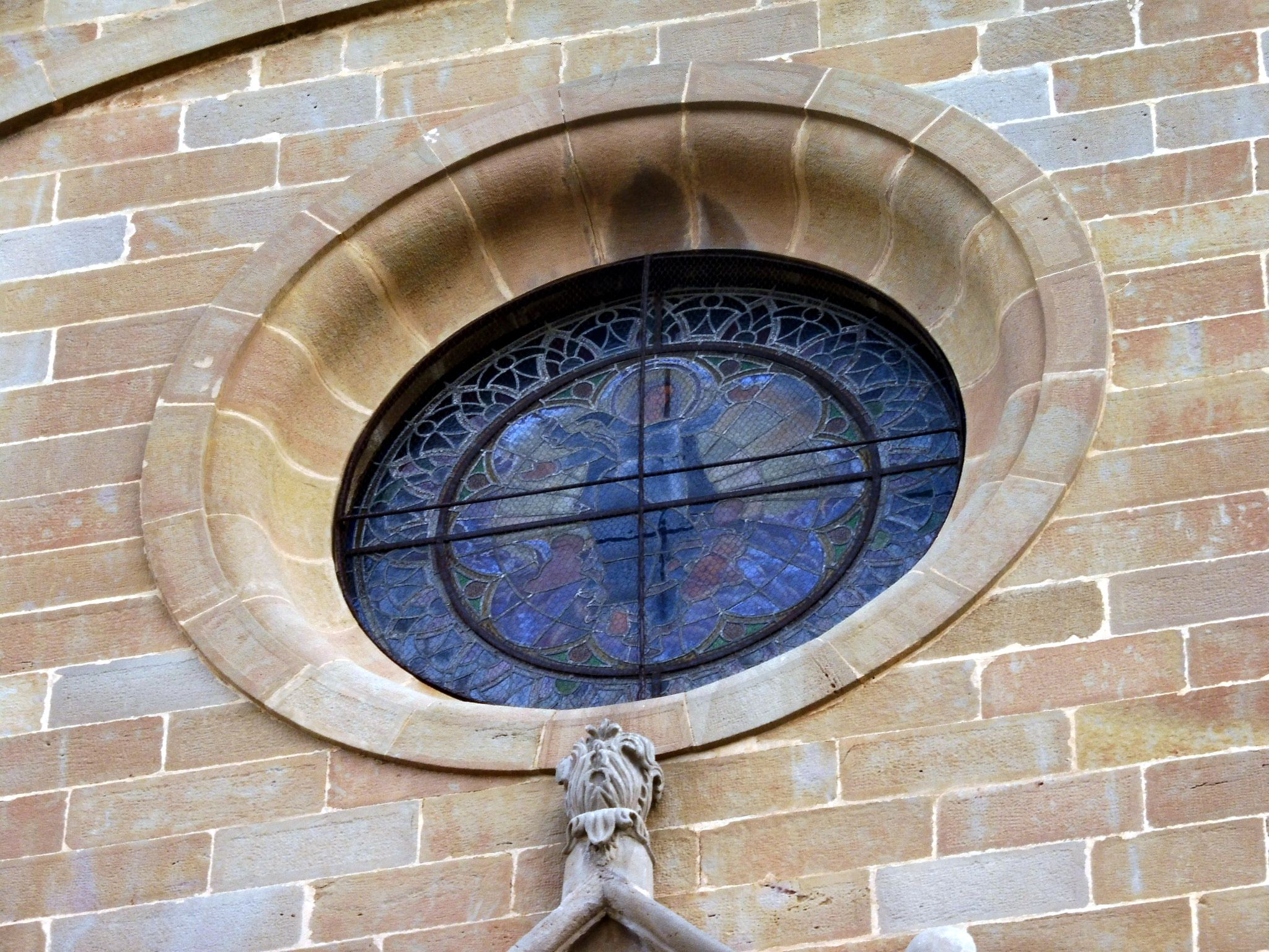 Església de la Mare de Déu de l'Assumpció de Montgai: ócul